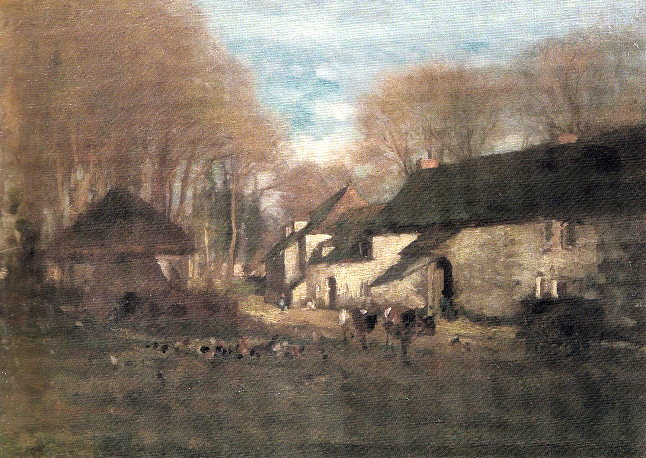 Satul Barbizon sau Fermă la Barbizon, ulei pe pânză lipită pe lemn - Muzeul Colecțiilor de Artă - Muzeul Zambaccian.